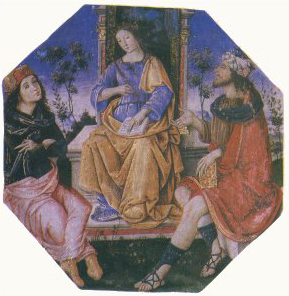 Nell’ottagono la regina e signora della natura и un altro esempio del ritorno delle antiche dee durante il Rinascimento.